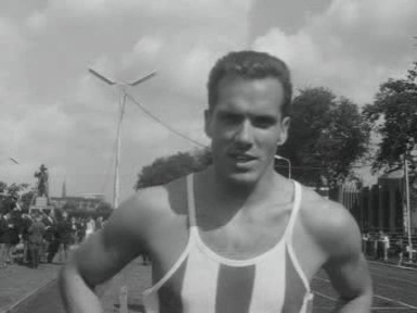 Nederlandse kampioenschappen atletiek te Rotterdam. Eef Kamerbeek wint de 110m horden.